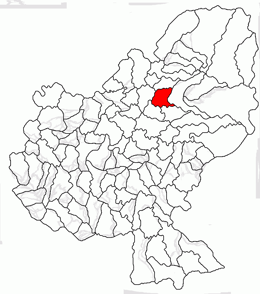 Categorie:Hărţi ale judeţului Mureş